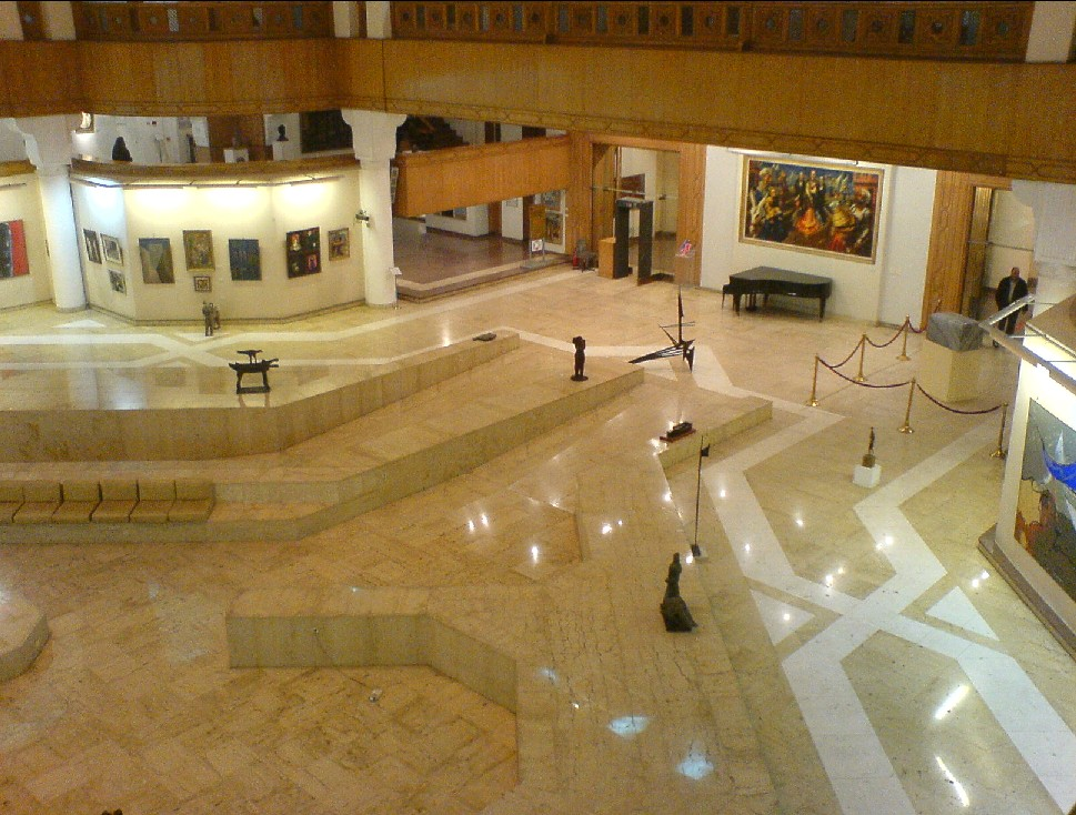 صورة للبهو الرئيسي لمتحف الفن المصري الحديث